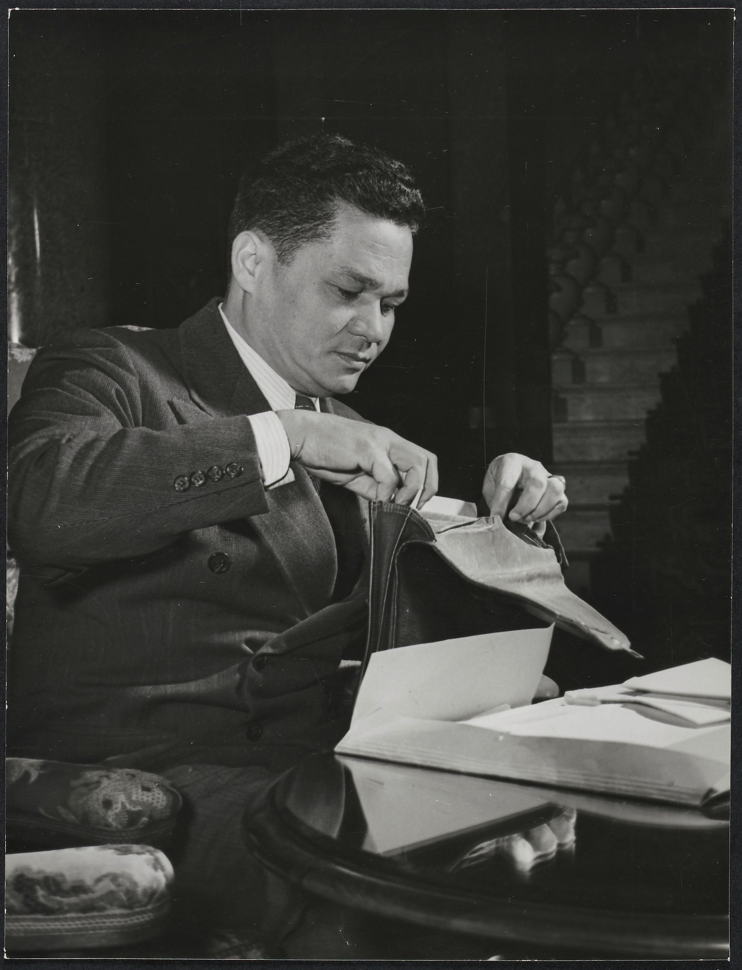 IdentificatieTitel(s): Een van de deelnemers aan de RTC: de heer F.H.R. Lim A PoSurinamers in Nederland: 29 foto's uit het archief van Ons Vrije Nederland (serietitel)Objecttype: documentaire foto Objectnummer: NG-2005-19-17Omschrijving: Een van de deelnemers namens Suriname aan de Ronde Tafel Conferentie tussen Nederland en de West: de jurist mr. F.H.R. Lim A Po, oud voorzitter van de Staten van Suriname (1943 - 1945) en advocaat. Hij is bezig papieren uit zijn tas te halen.VervaardigingVervaardiger: fotograaf: ParticamPlaats vervaardiging: Den HaagDatering: feb-1948Materiaal: fotopapier Techniek: fotografieAfmetingen: h 20 cm. × b 15 cm. OnderwerpWat: Rondetafelconferentie (1948)Wanneer: 1948-02 - 1948-02Waar: Den HaagNederlandSurinameWie: F.H.R. Lim A PoVerwerving en rechtenVerwerving: aankoop 2005Copyright: Publiek domein